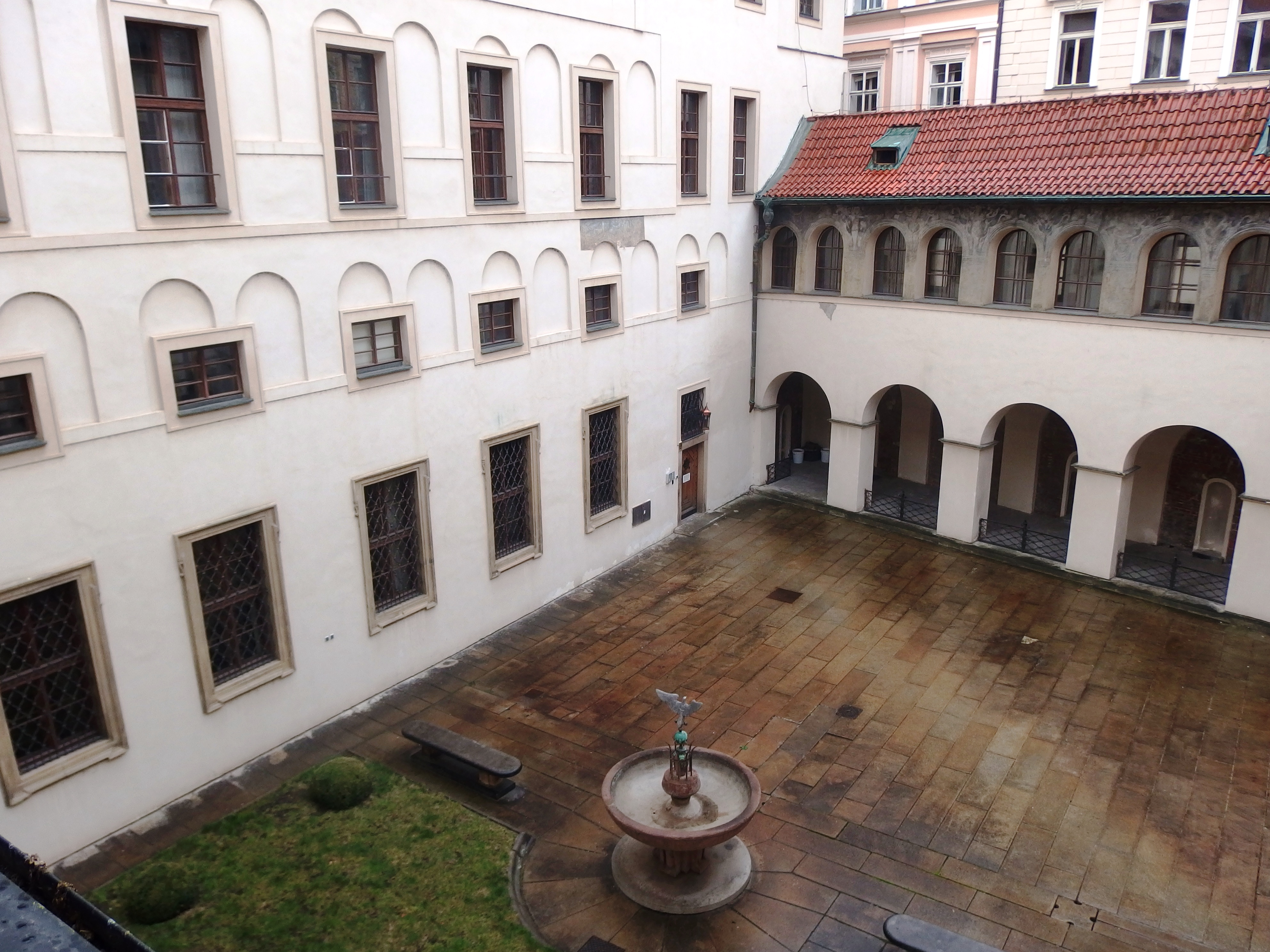 Michnovský palác, Újezd 450/40, Všehrdova 450/16, Praha 1, Malá Strana.